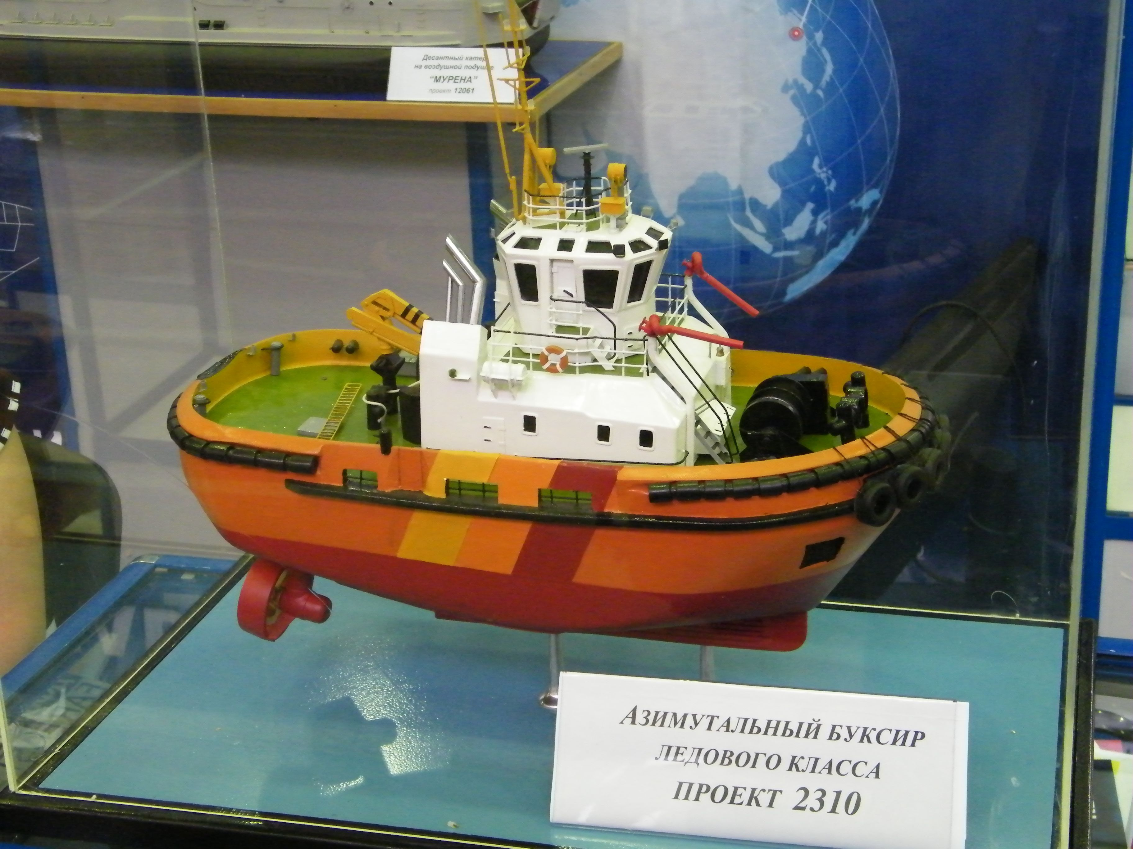 Модель азимутального буксира ледового класса проект 2310. Выпускается Хабаровским судостроительным заводом